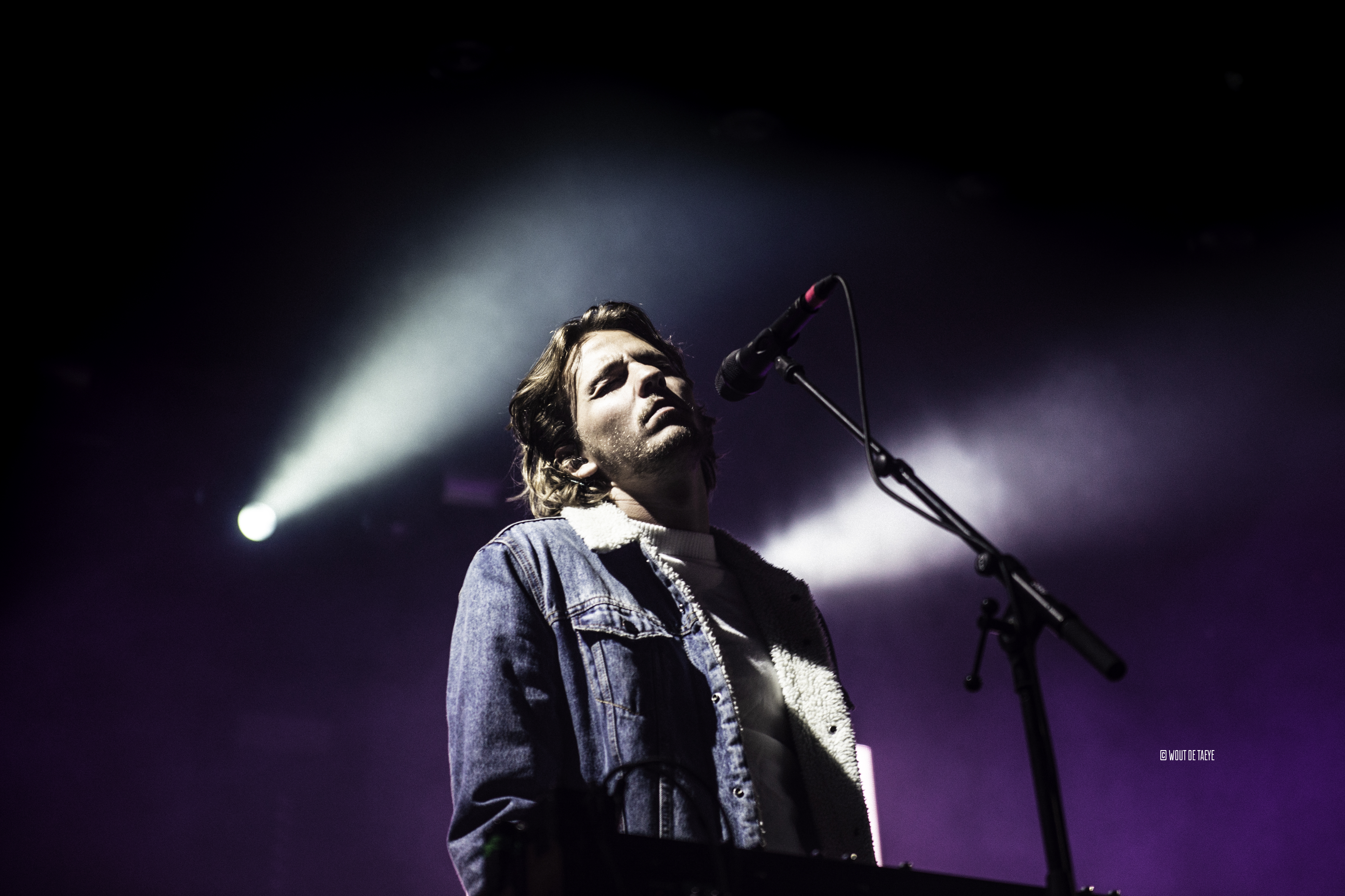 © Wout De Taeye